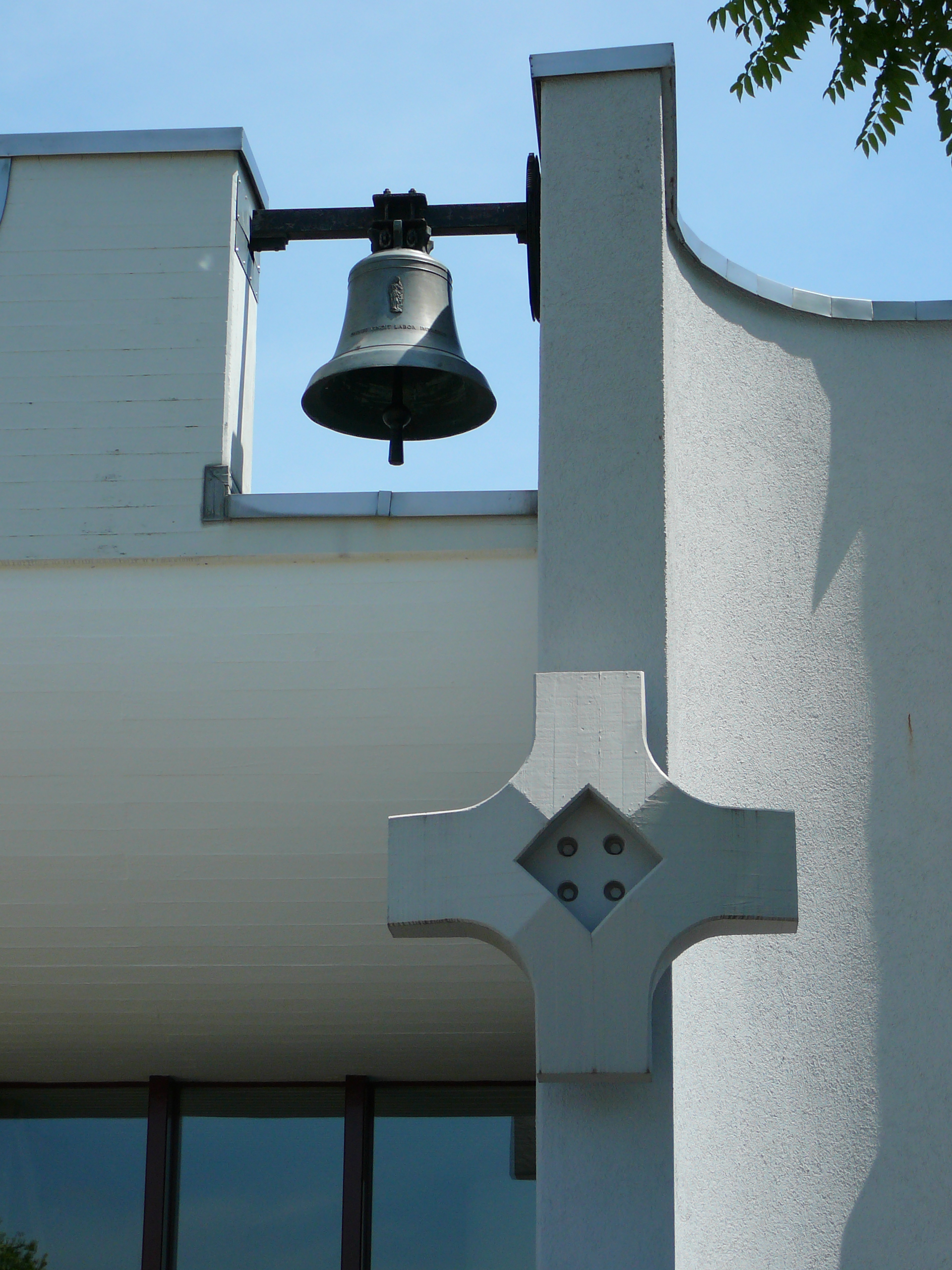 Römisch-katholische Kirche St. Mauritius Regensdorf, Dachreiter und Betonkreuz